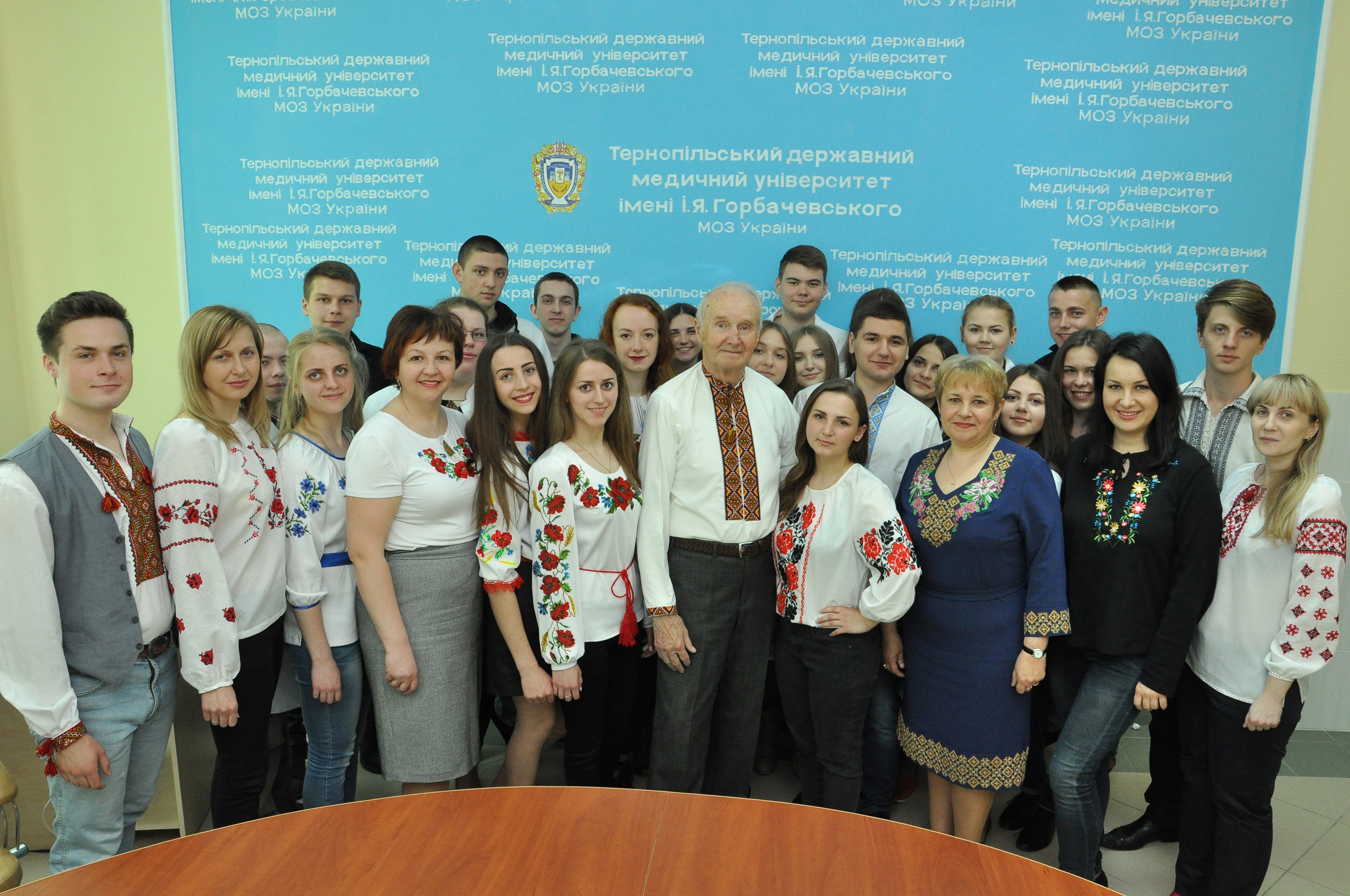 Горбачевські читання на кафедрі біохімії Тернопільського державного медичного університету імені І. Я. Горбачевського.